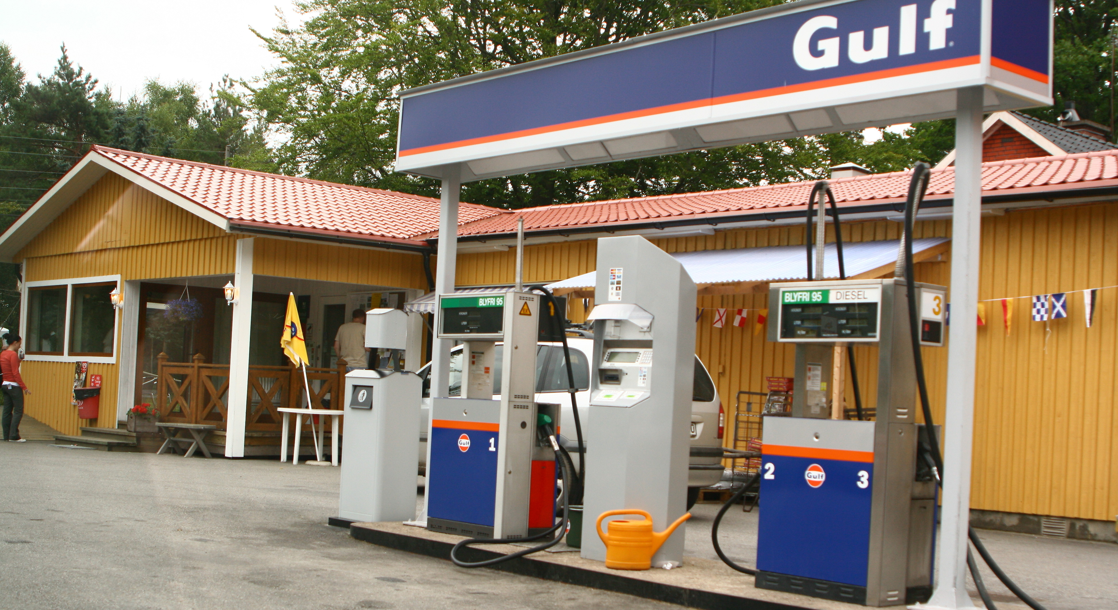 Gulf-mack i Småland intill halvön bolmen. "Ljungby"